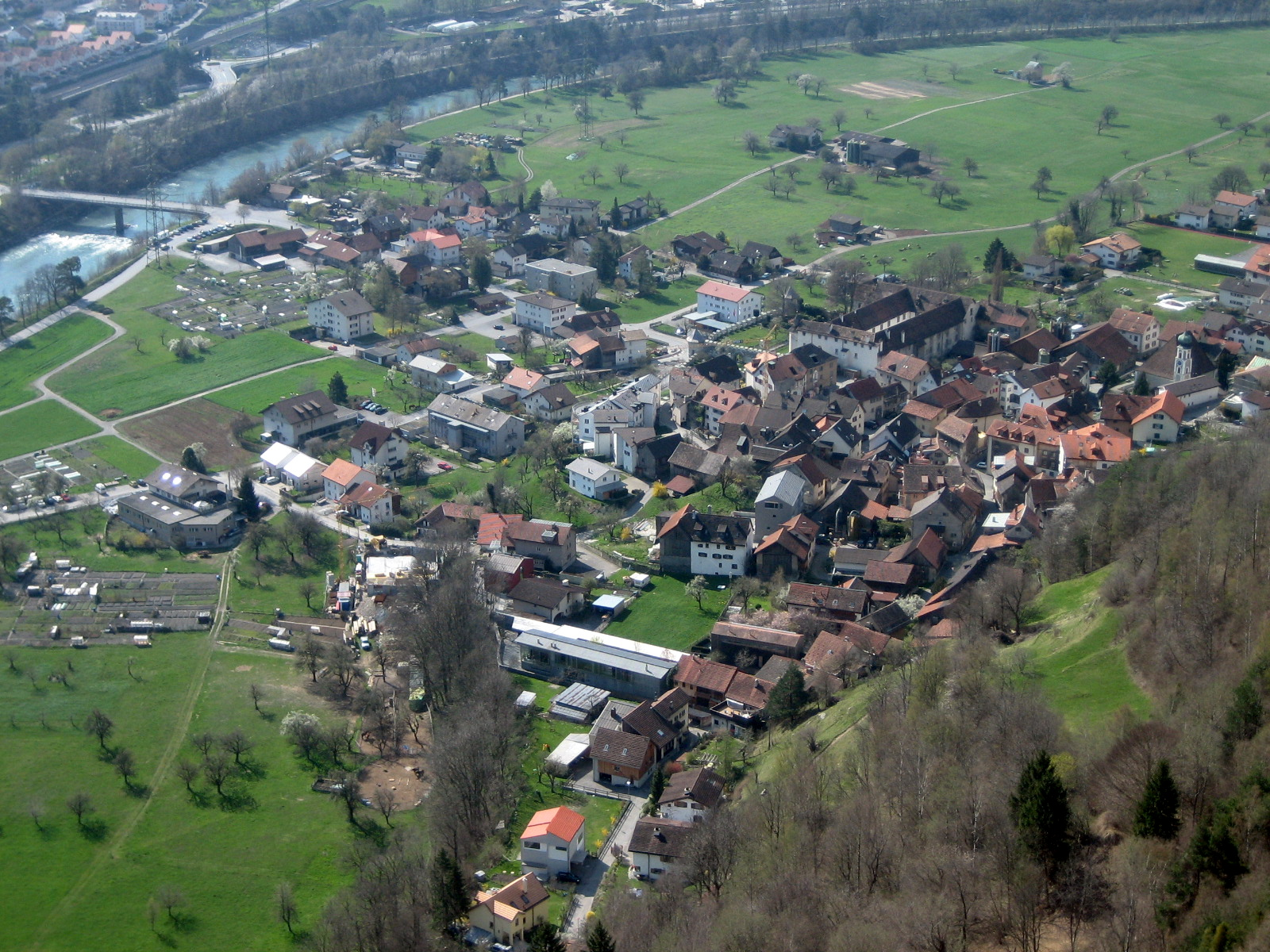 Haldenstein, von Lichtenstein aus gesehen